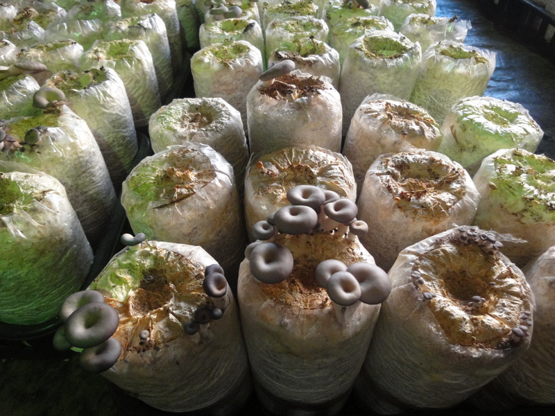 中文（台灣）: 新社菇類種植